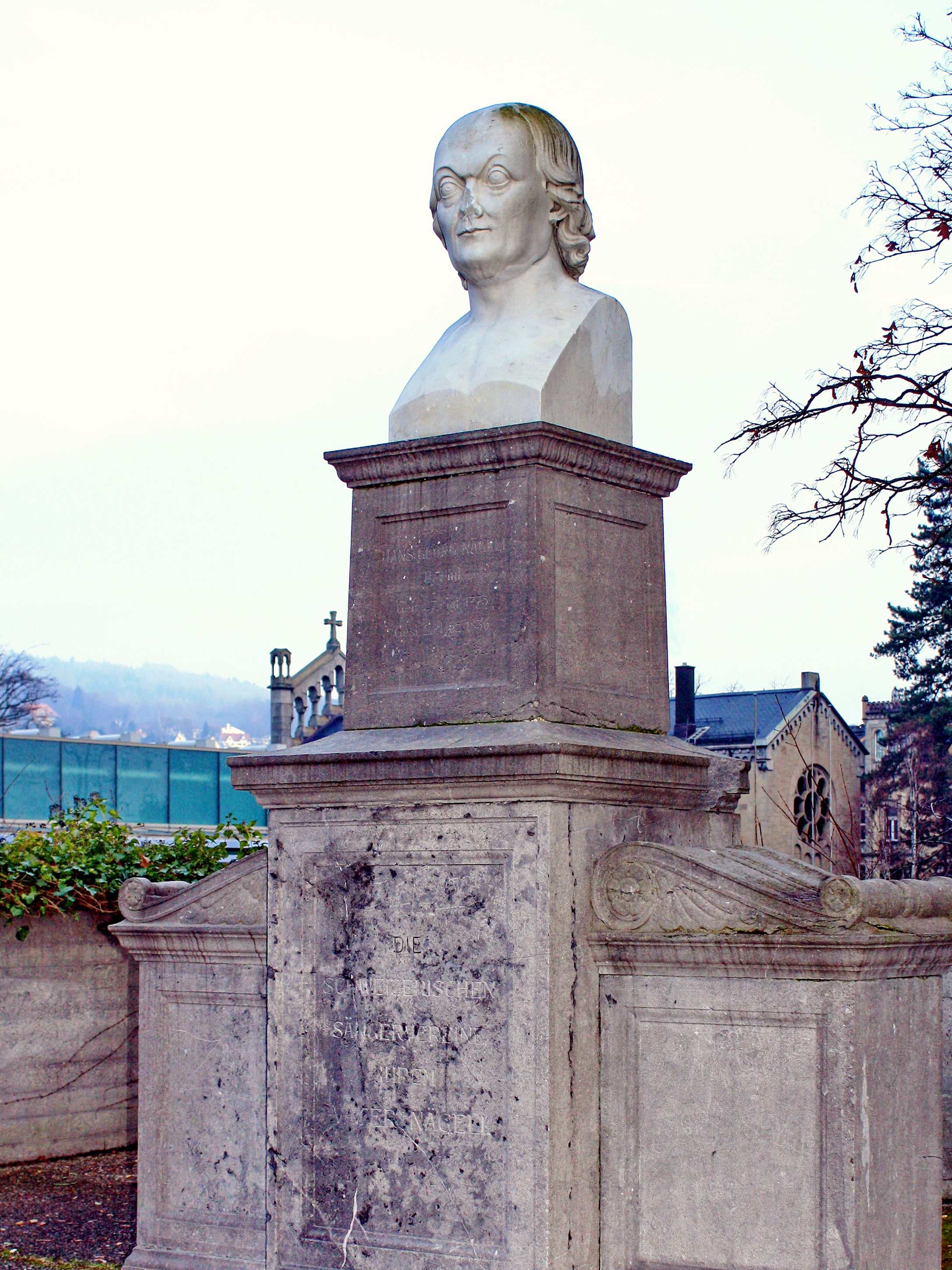 Hans Georg Nägeli-Denkmal. 1848 erhielt Johann Jakob Oechslin von den Schweizerischen Sängervereinen den Auftrag, zu ehren von Nägeli ein Denkmal zu schaffen. Die überlebensgrosse Marmorbüste wurde auf der Hohen Promenade in Zürich plaziert und trägt die Jahreszahl 1847.